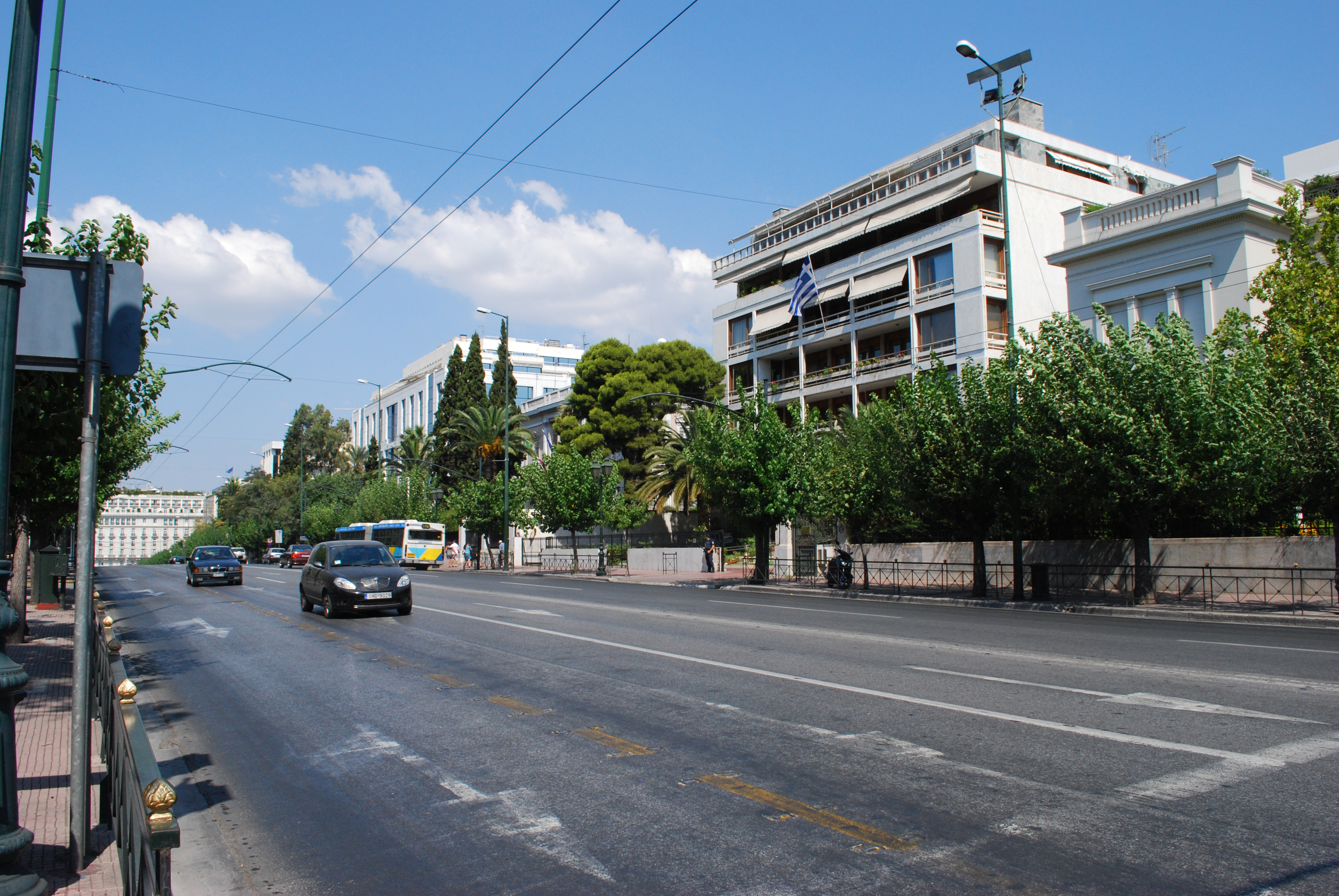 Vue de l'avenue Reine Sophie à Athènes.